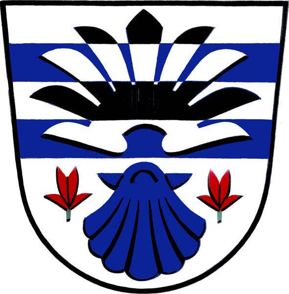 Znak Lesnice